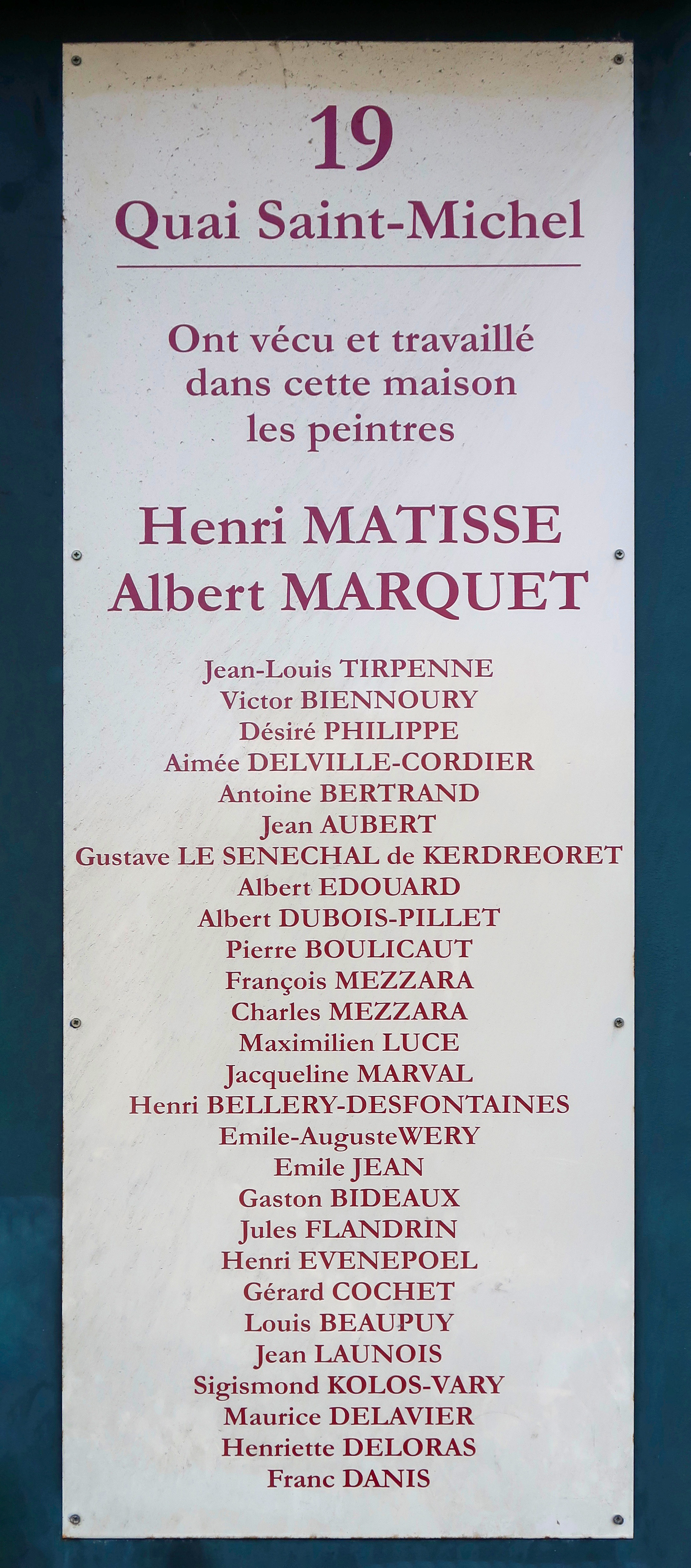 Plaque en hommage à Henri Matisse et Albert Marquet, 19 quai Saint-Michel (Paris 5e).